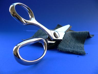 Ik ben zelf de maker van deze foto